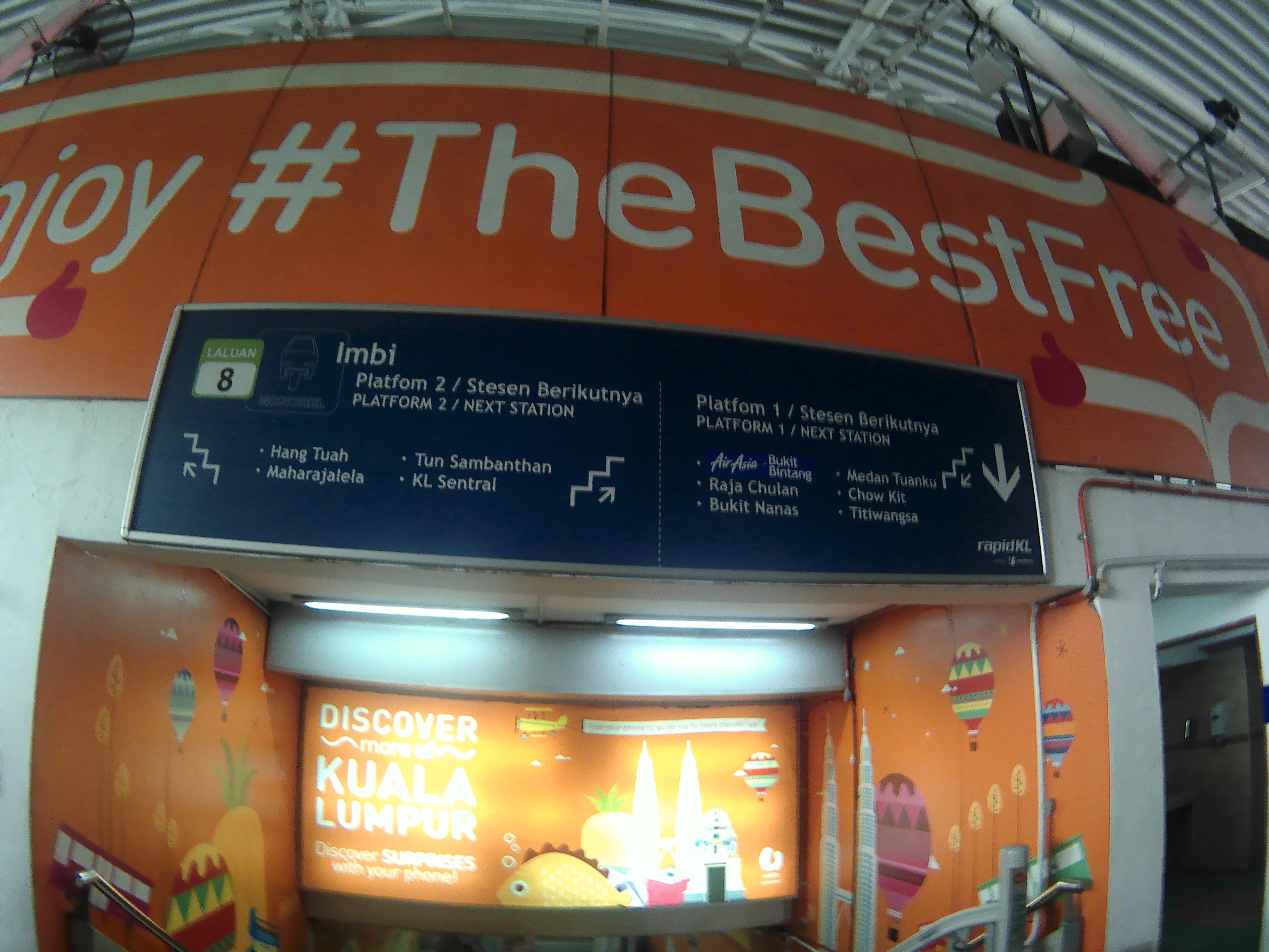 Imbi station signboard